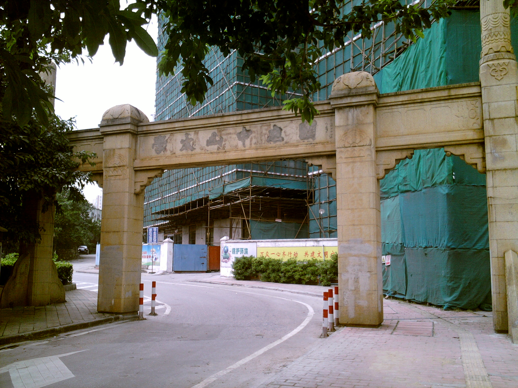 文化大革命期間塗抹在國立中山大學西門牌坊正面的「國立中山大學」字體上的英泥，牌坊上亦被塗上「為人民服務」、「偉大的中國...」及「偉大的領袖...」等文字。牌坊由國立中大首任校長鄒魯題字。